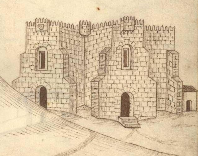 Santuário de Nossa Senhora da Boa Nova em Terena, Alandroal, Portugal, tal como aparece no Livro das Fortalezas, de 1509-1510.